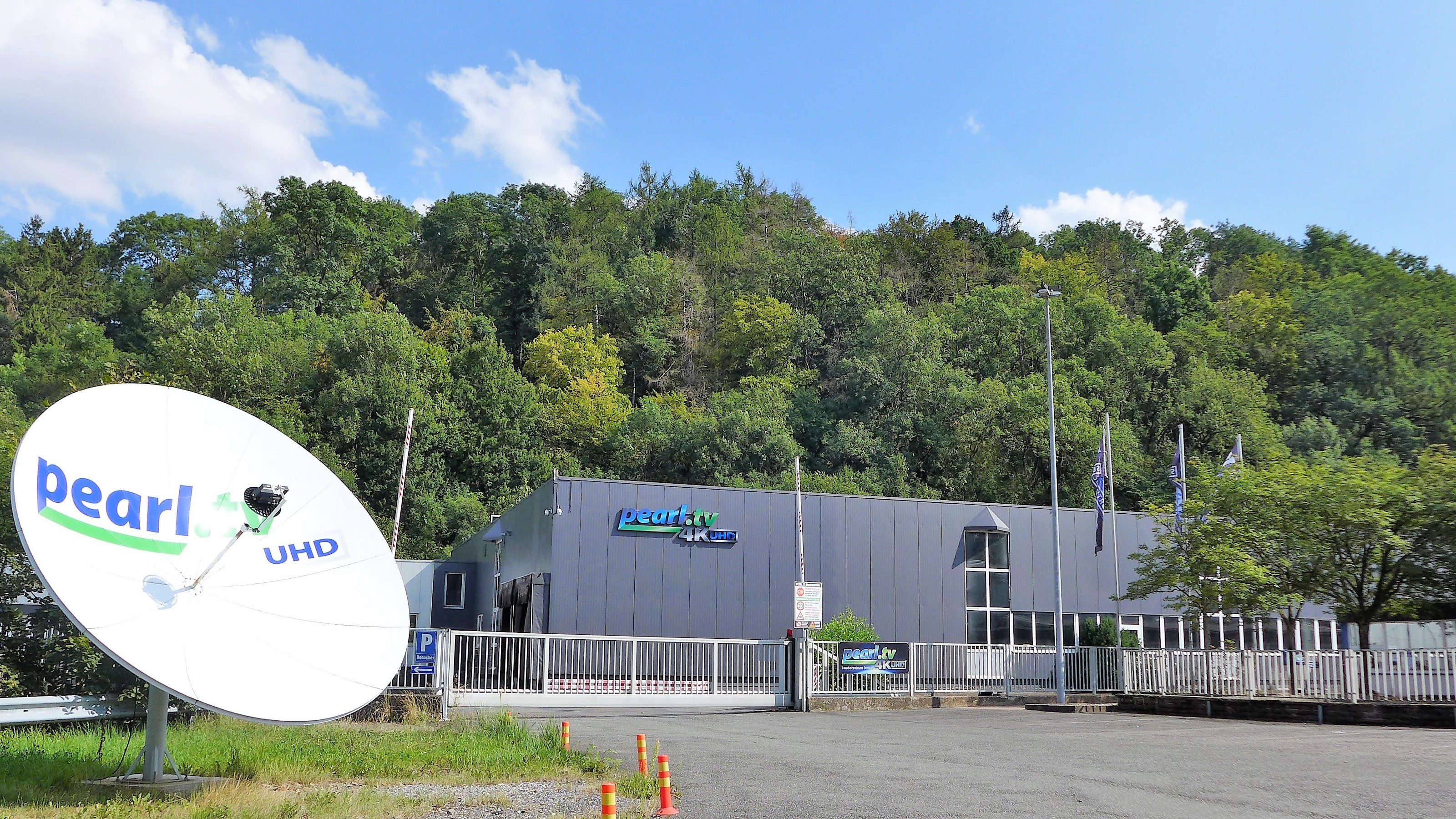 2019 vor dem Burgberg in Dassel